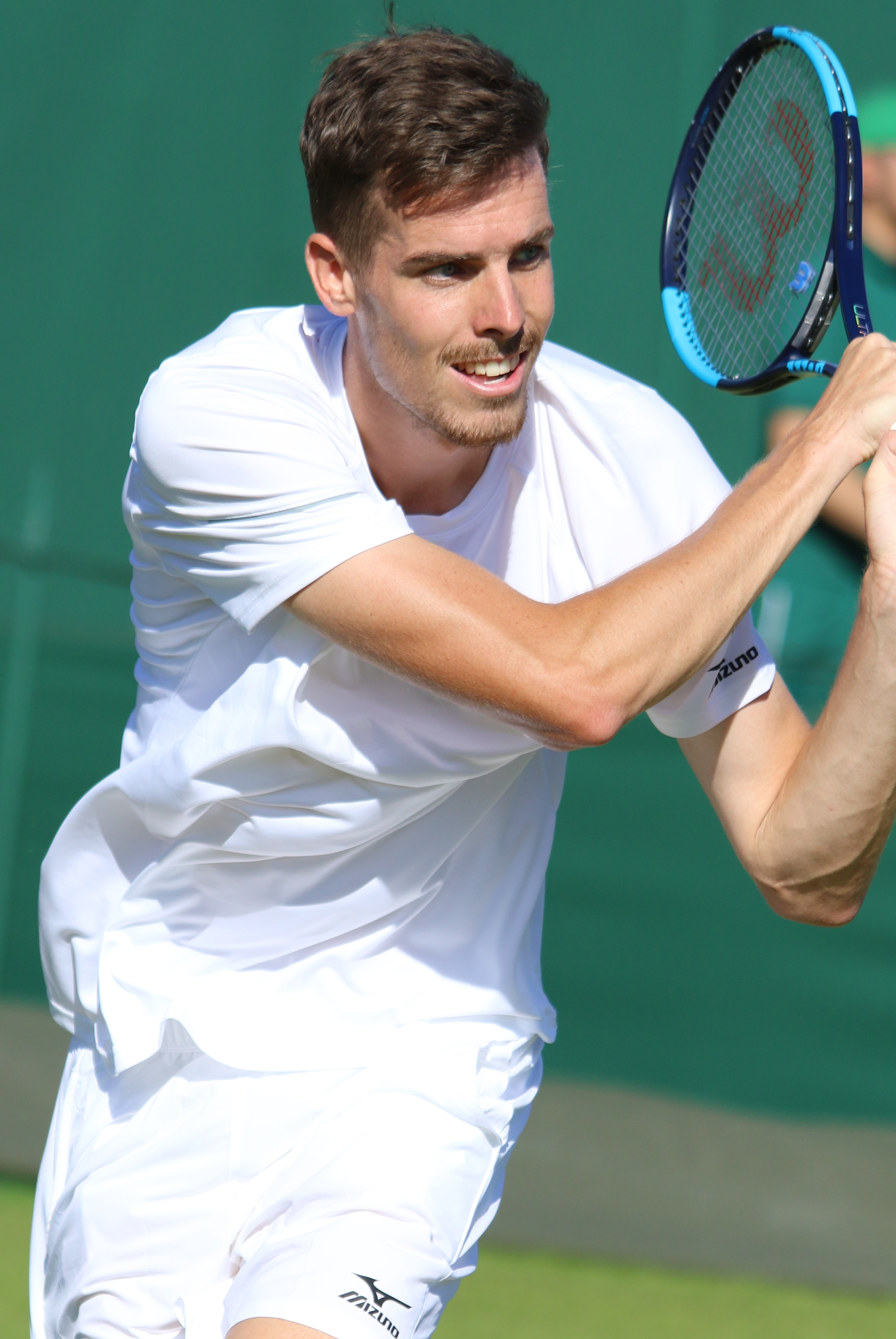 Moraing WMQ18 (8)